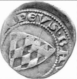 Kwartnik Henryka III. Rewers. autor: mzopw licencja: GNU FDL